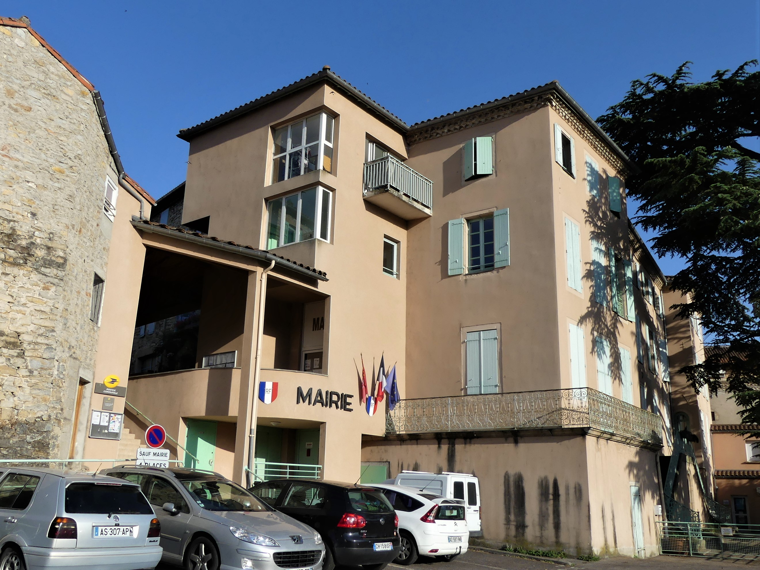 La mairie de Saint-Georges-de-Luzençon, Aveyron, France.